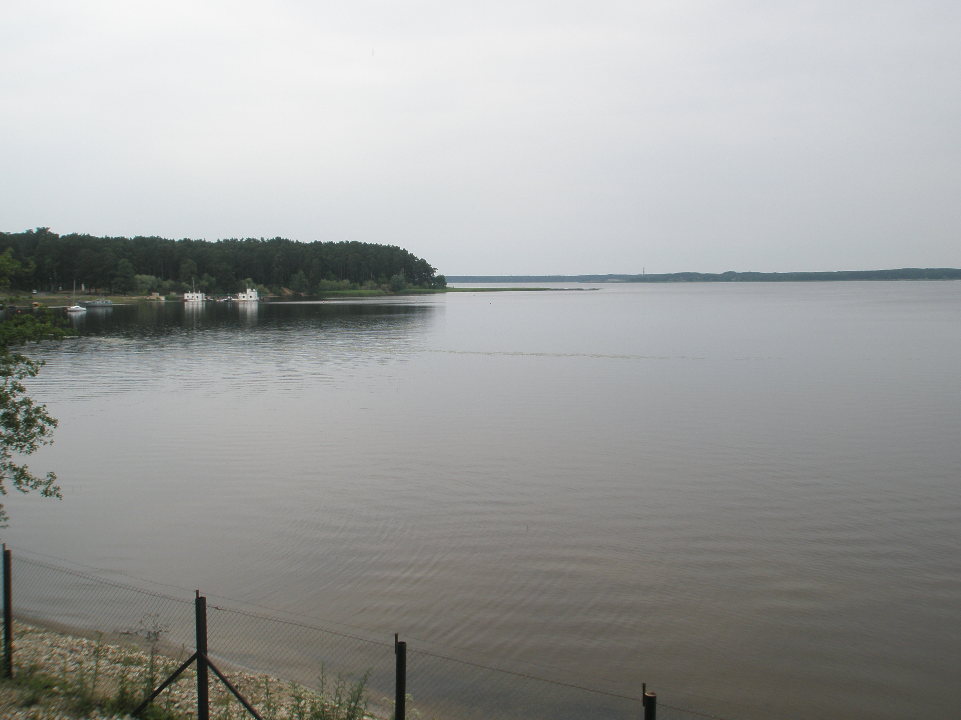 Ķīšezers pie Zooloģiskā dārza